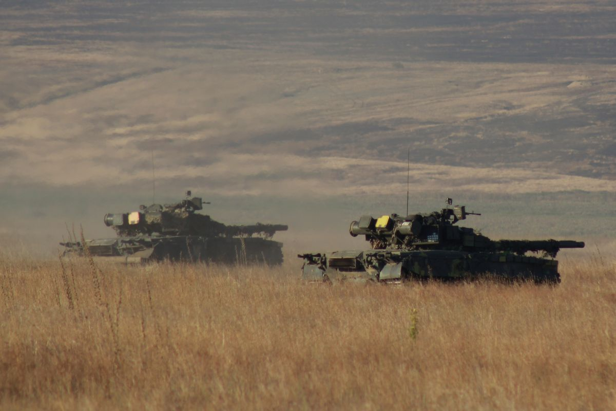 На загальновійськовому полігоні Широкий Лан завершилась активна фаза тактичних навчань особового складу 79 окремої десантно-штурмової бригади Високомобільних десантних військ ЗС України. Десантники здійснили марш, під час якого подолали водну перешкоду комбінованим способом. Прибувши у визначений район “крилаті піхотинці” приступили до виконання бойових завдань. У рамках навчань поєднувалися рейдові та пошуково-ударні дії з бойовою стрільбою, утриманням десантниками визначеного району та знищення виявлених позицій умовного противника. Вогневе ураження “ворога” здійснювалося силами артилерії, танкового підрозділу, мінометних, зенітних та протитанкових розрахунків. Навчання проводилися в тісній взаємодії з підрозділами армійської авіації. Зокрема, в ході рейду рух колон з повітря прикривали вогнем ударні вертольоти Мі-24, з вертольоту Мі-8 за допомогою системи “Адаптер- М1” здійснювалося безпарашутне десантування штурмових груп. Варто зазначити, що до тактичних навчань залучався особовий склад оперативного резерву. Фото: Руслан Лінник